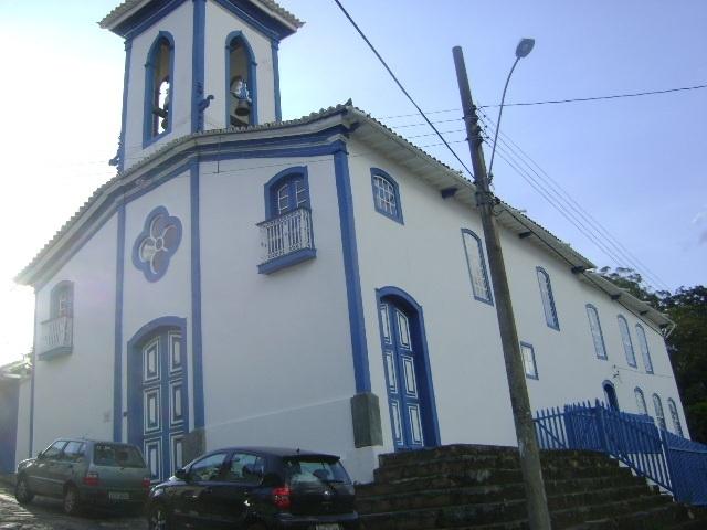 A igreja de Nossa Senhora das Mercês em Diamantina está localizada à Rua das Mercês, Centro histórico de Diamantina. Ao abandonar a Irmandade de Nossa Senhora do Rosário dos homens pretos foi criada a Irmandade de Nossa Senhora das Mercês. Em São João Del Rei há também uma igreja de Nossa Senhora das Mercêz